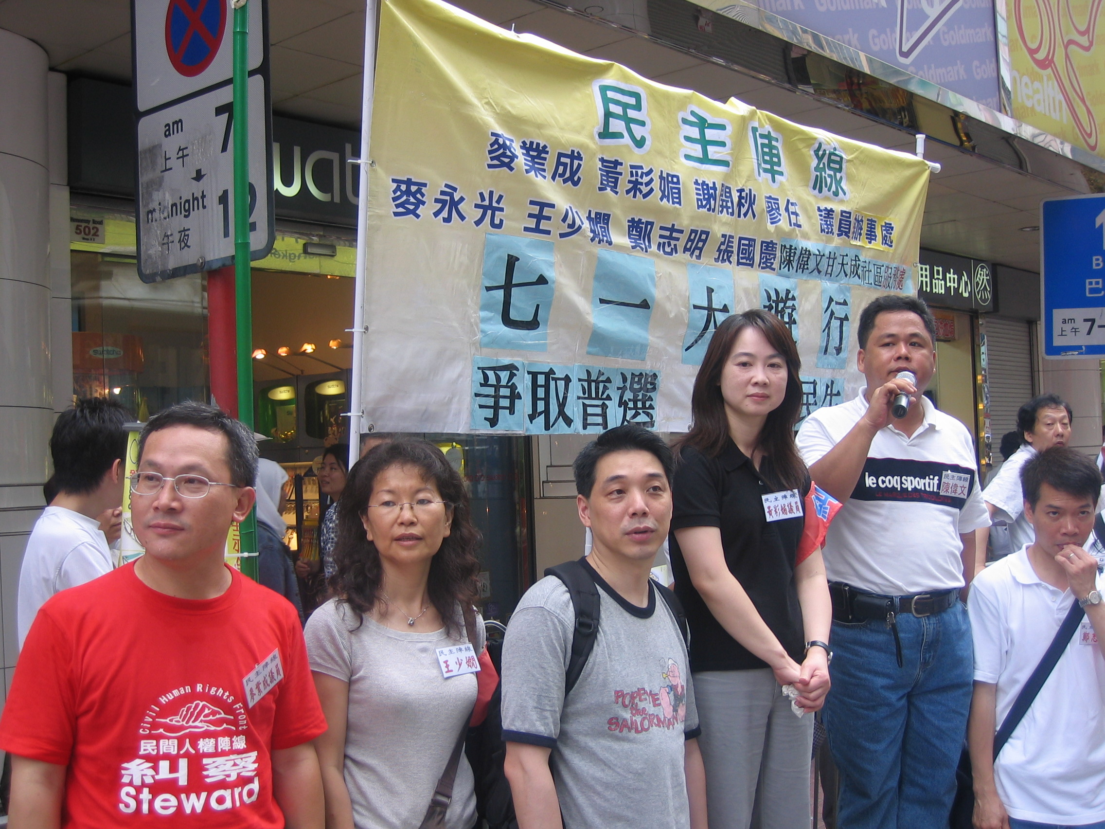 元朗天水圍民主陣線，參加2007年七一遊行。麥業成、陳少嫻、黃彩媚等。